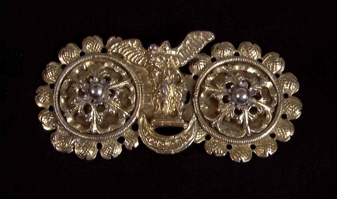 Støpt draktspenne med utklipningsarbeid i forgylt sølv, antakelig fra 1500-årene. Sentralmotivet viser en engel med to barn på en månesigd, og er kanskje en symbolsk fremstilling av jomfru Maria himmelfart. Innkjøpt i 1897 fra Valle i Aust-Agder. Foto Norsk Folkemuseum / Anne-Lise Reinsfelt, NF-1897-0884.